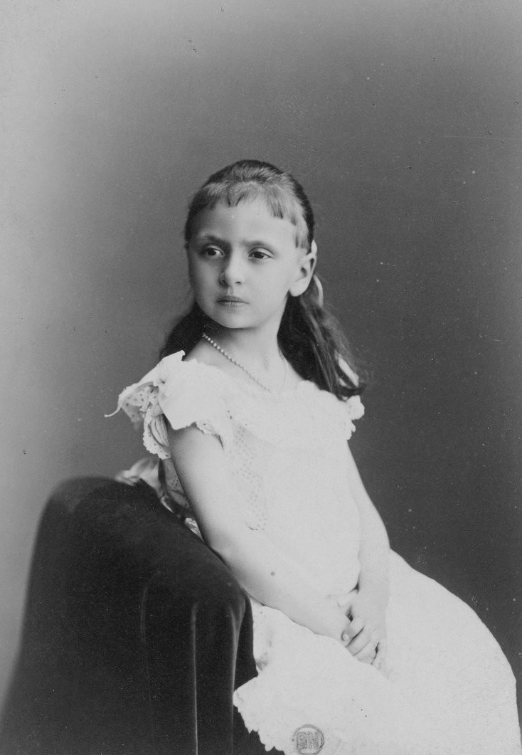 Infante Elvire de Bourbon (1871-1929).